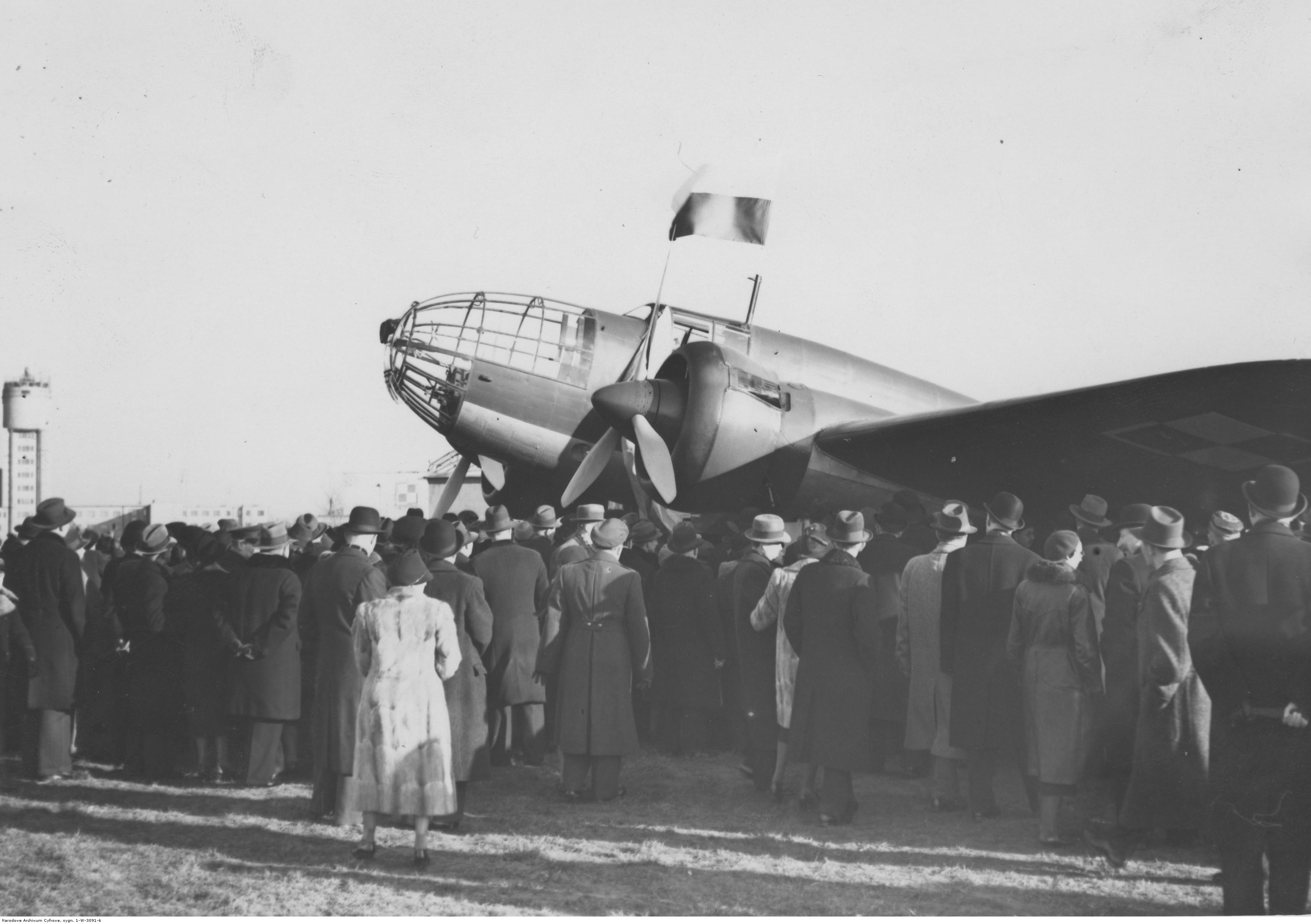 Przekazanie wojsku na lotnisku Okęcie samolotu PZL.37A Łoś nr 72.11, ufundowanego przez pracowników: Pocztowej Kasy Oszczędności, Banku Polskiego, Banku Gospodarstwa Krajowego, Polskiego Banku Rolnego.